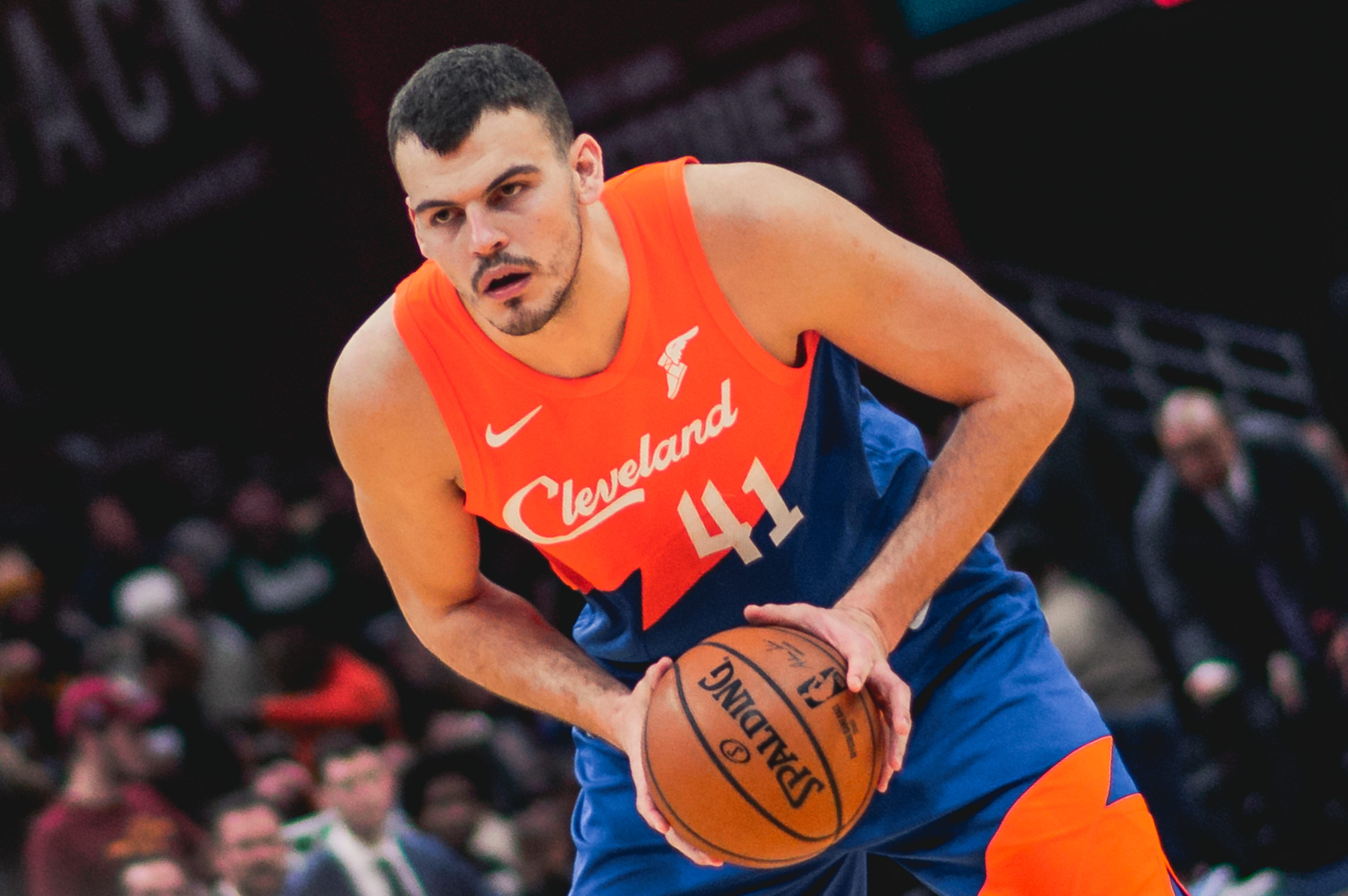 Cleveland Cavaliers vs. Brooklyn Nets